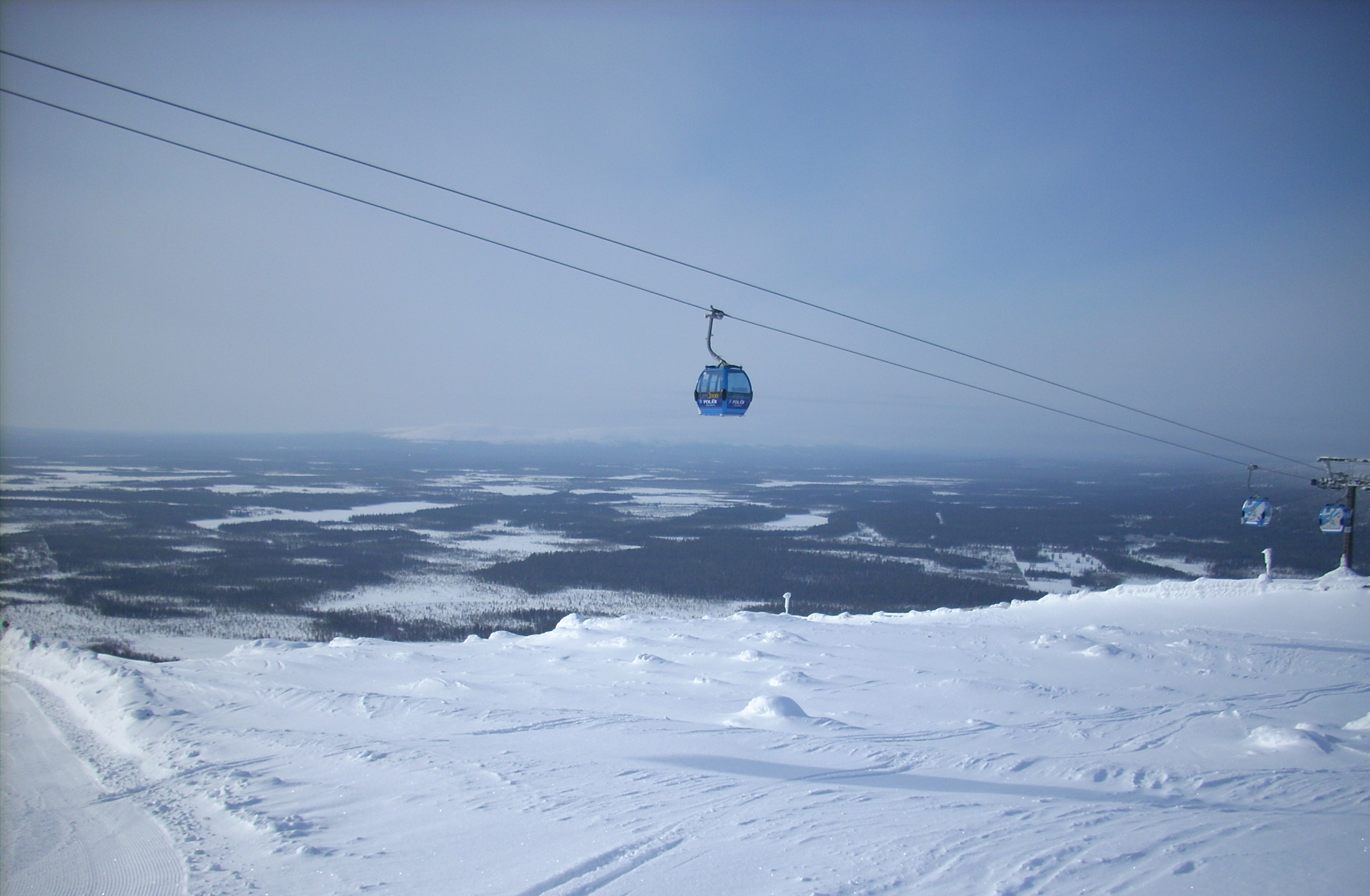 Kuva Levin gondolihissistä.